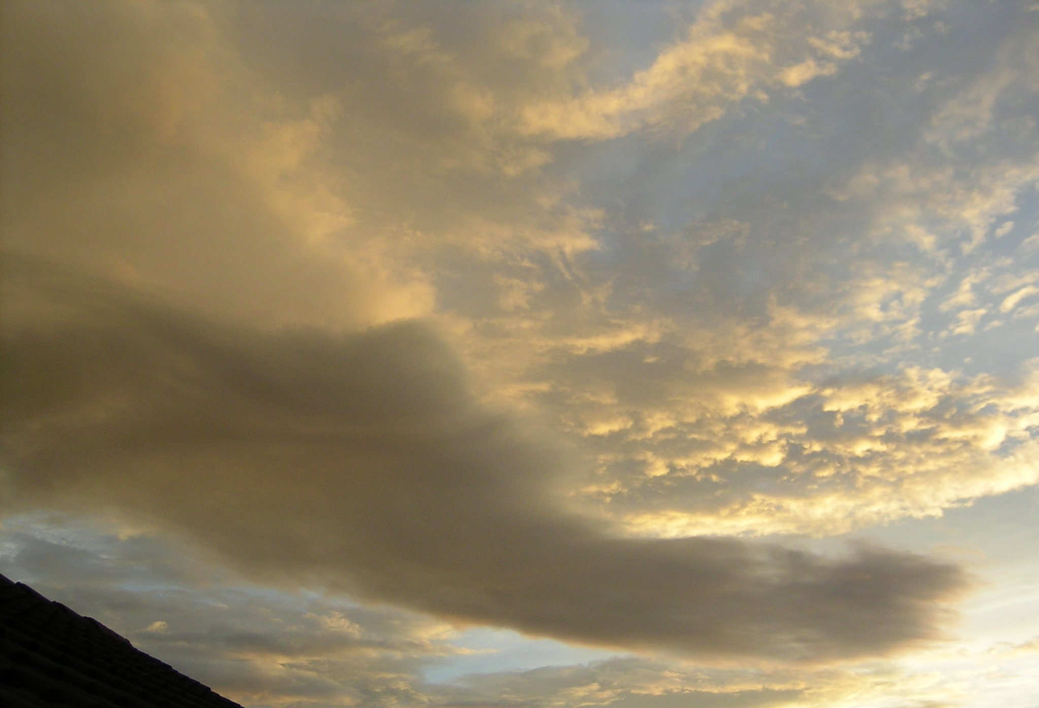 (en) Dissolved anvil of a Cumulonimbus (de) Aufgelöster Amboss eines Cumulonimbus Aufnahmeort: Bearbeitung: GIMP Zugeschnitten